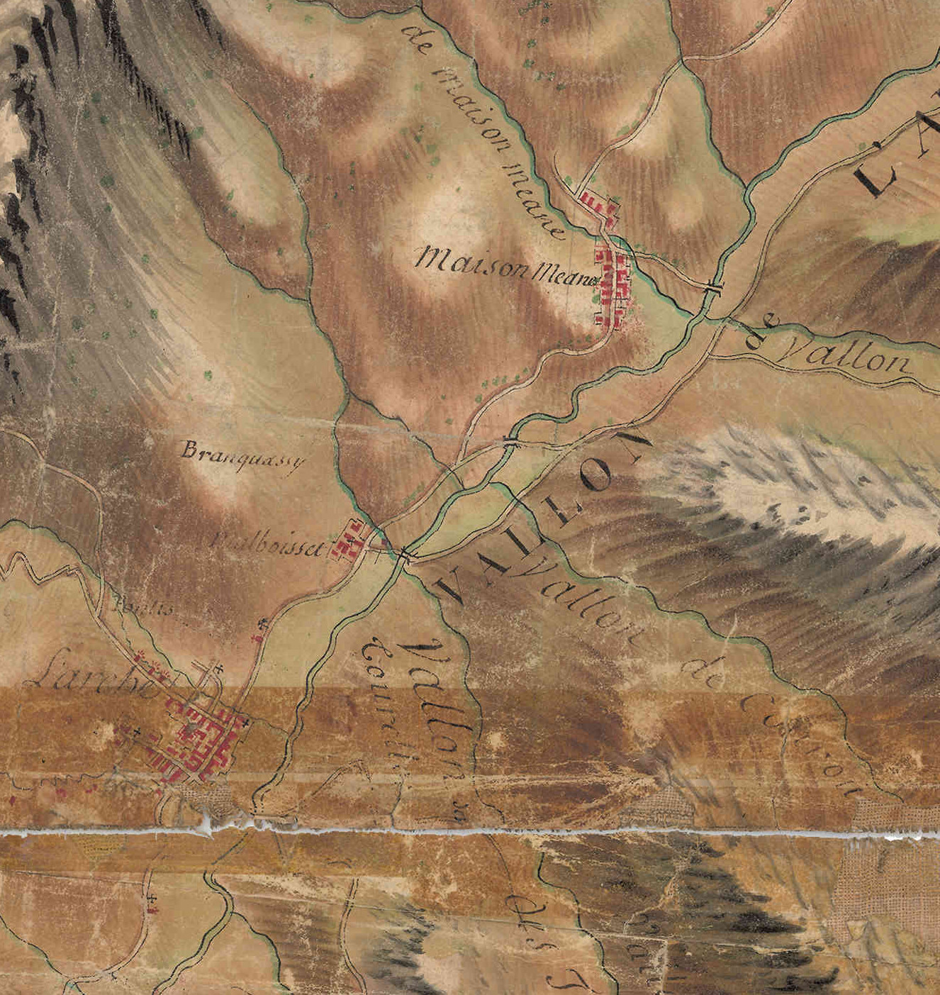 carte de Bourcet numérisé Paris, Nicolas-Alexandre et Olivier-Joseph, Extrait réduc JPG 30% Antoine-H